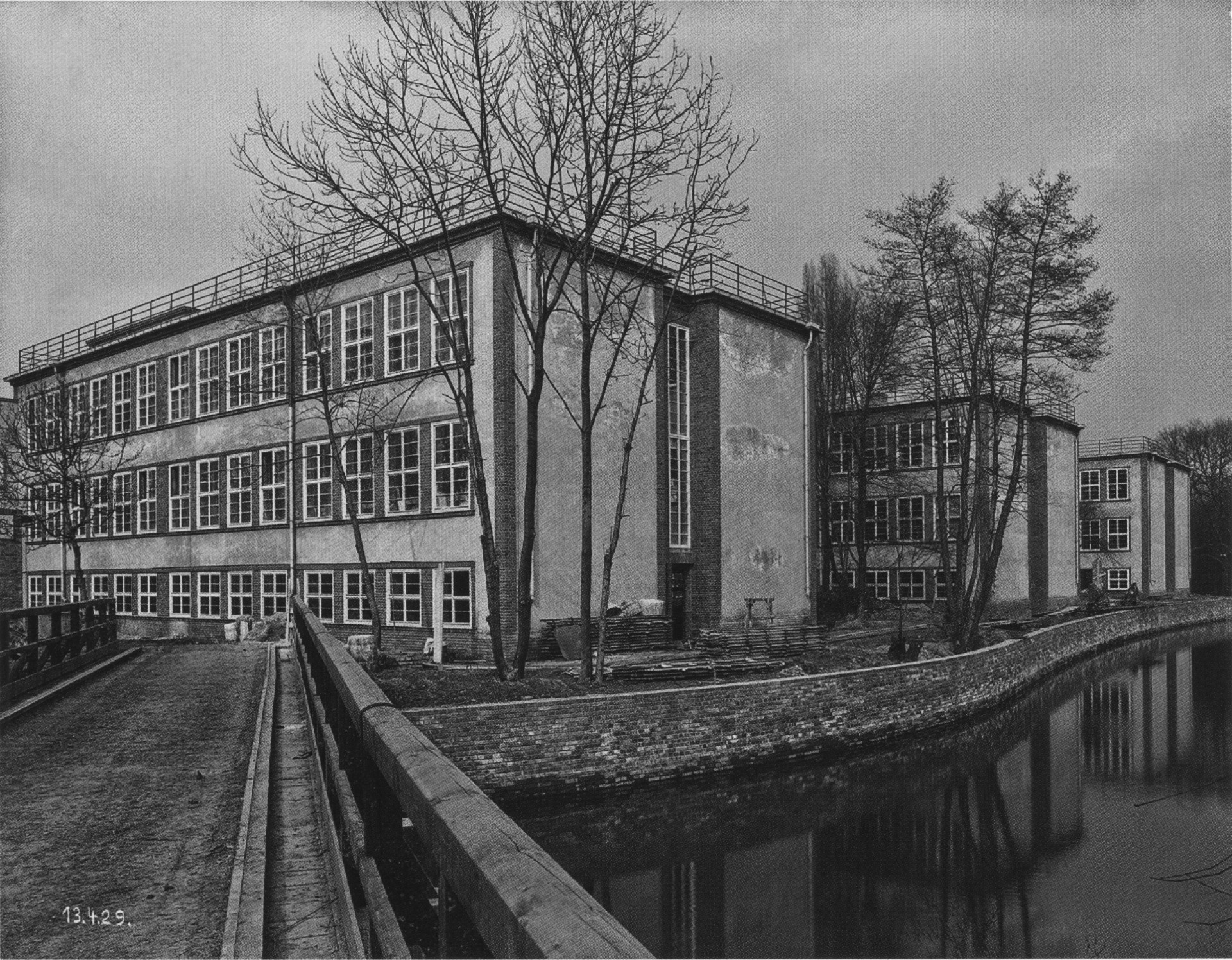 Max-Klinger-Schule in der Karl-Heine-Straße 22b. Architekten: Hubert Ritter und Fritz Baumeister. Die ehemalige IV. Höhere Mädchenschule wird heute von der Universität Leipzig genutzt.